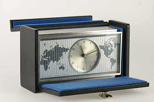 Erste europäische Quarzuhr für den Endverbraucher "Astrochron", Junghans, Schramberg, ab 1967 (Deutsches Uhrenmuseum, Inv. 1995-603)